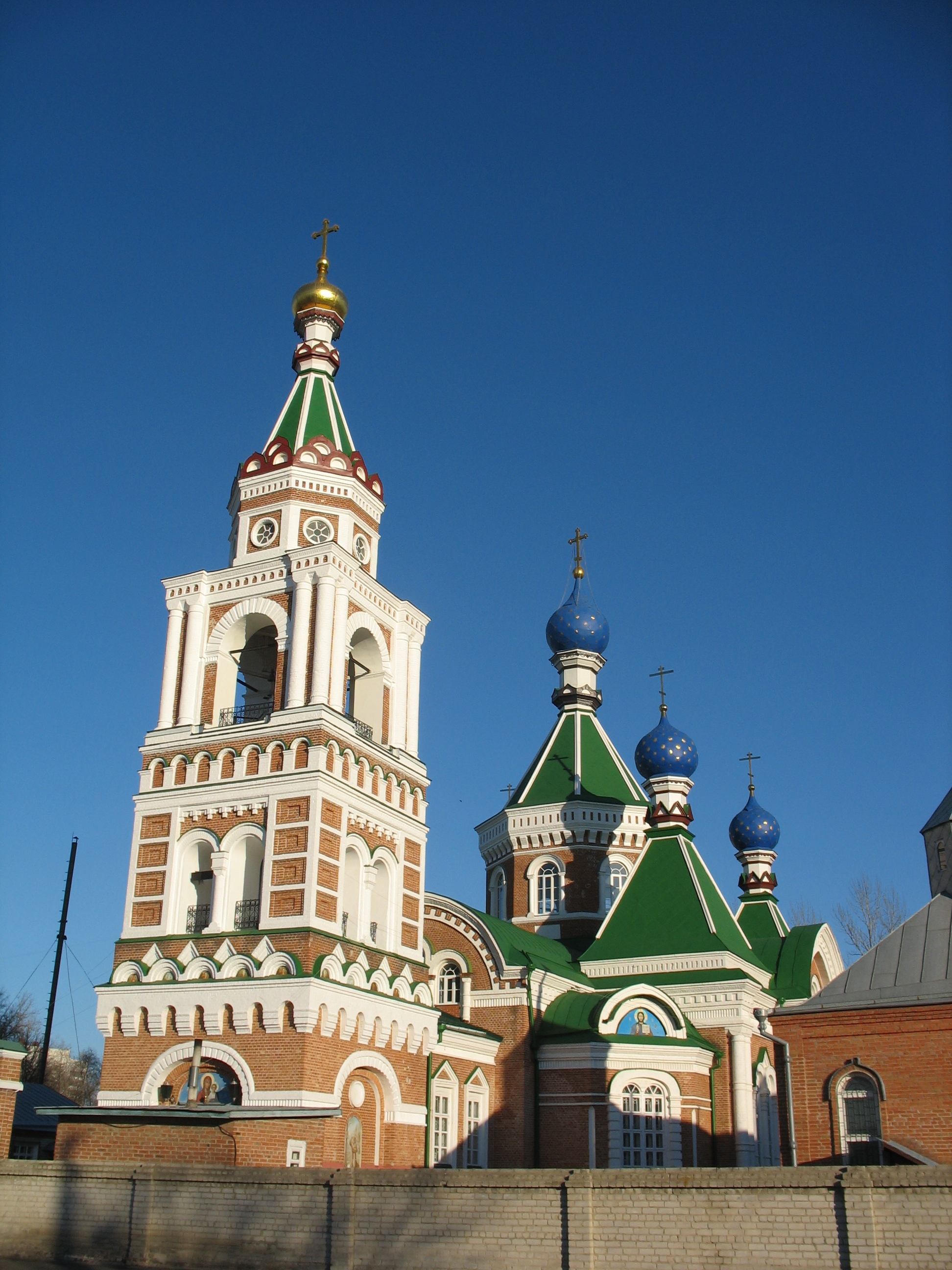 Воронеж. Казанская церковь (1909 год)